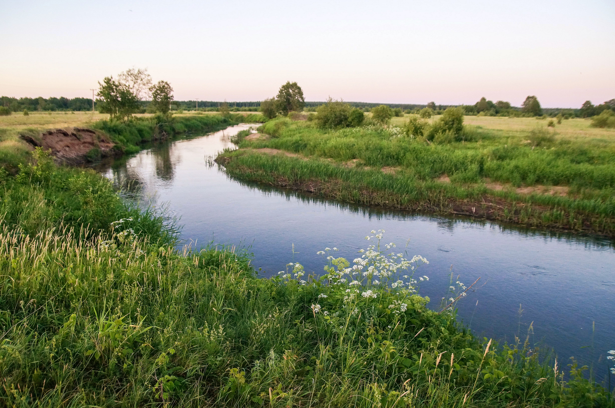 Ілія ля вёскі Рыбчанка